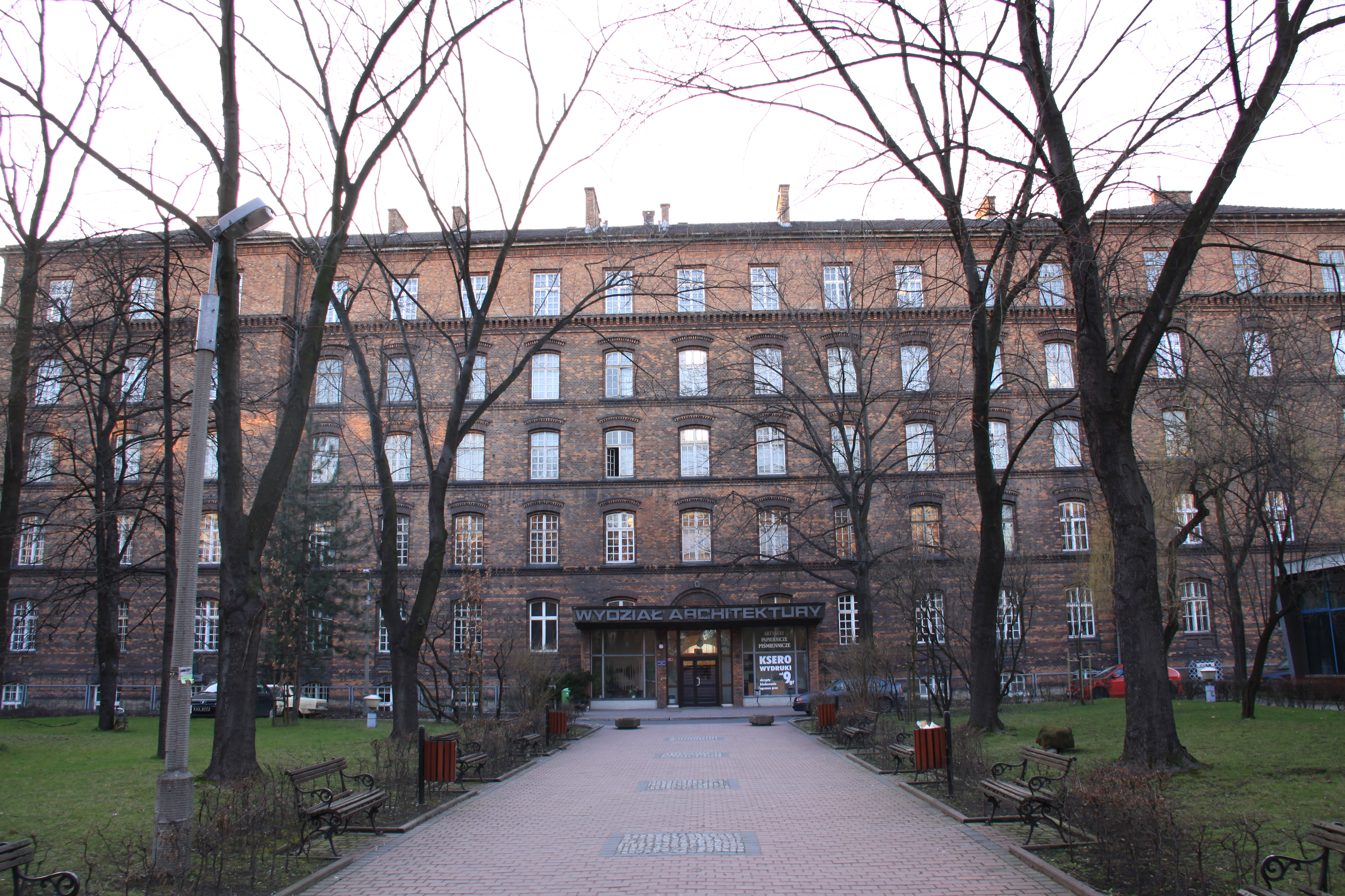 Politechnika Krakowska, Wydział Architektury.